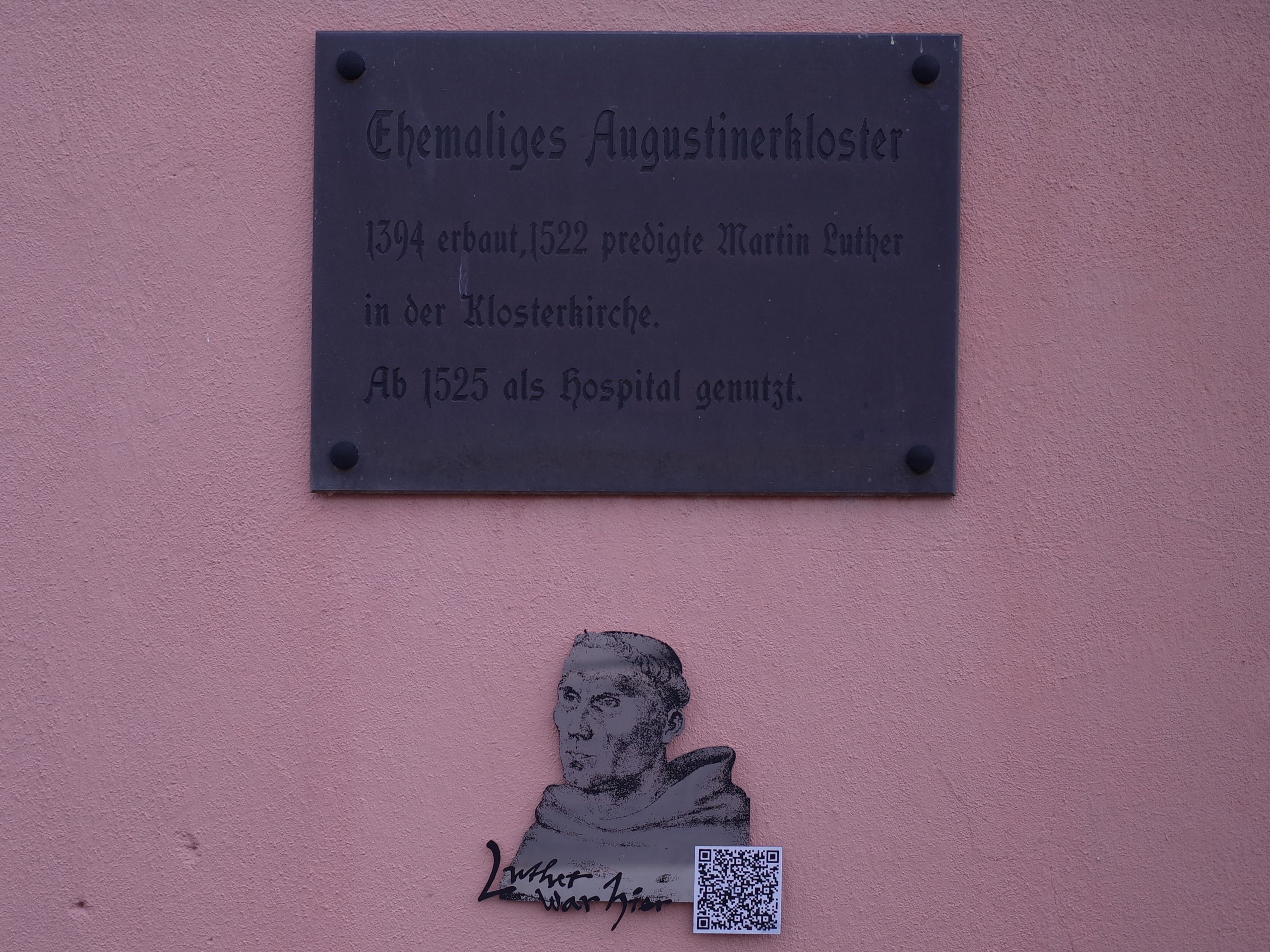 Zerbst/Anhalt, Am Plan 4, ehemaliges Augustinerkloster. Informationstafel über das Kloster und Luther-Orte in Sachsen-Anhalt.